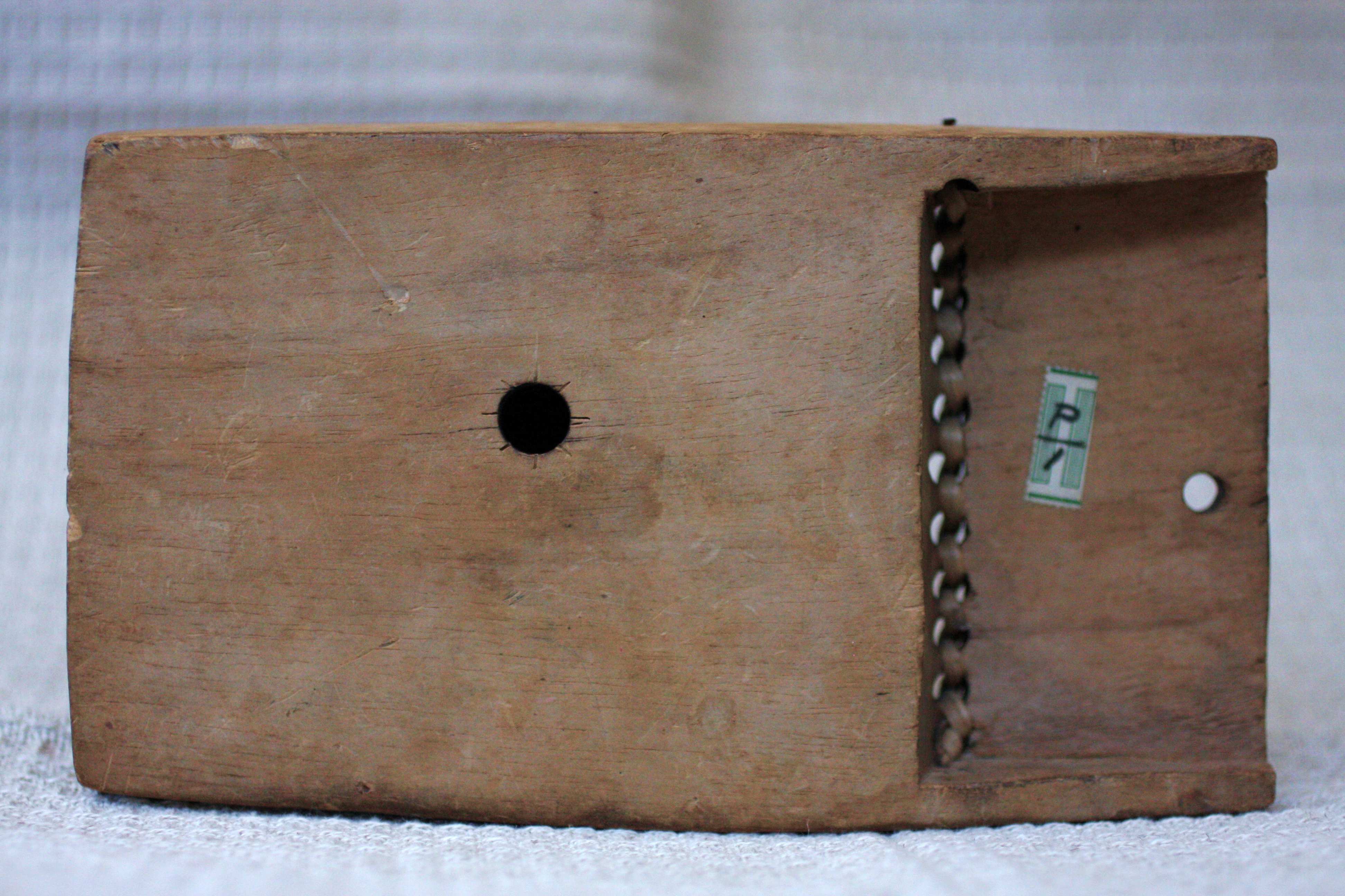 Egy kalimba hangnyílása